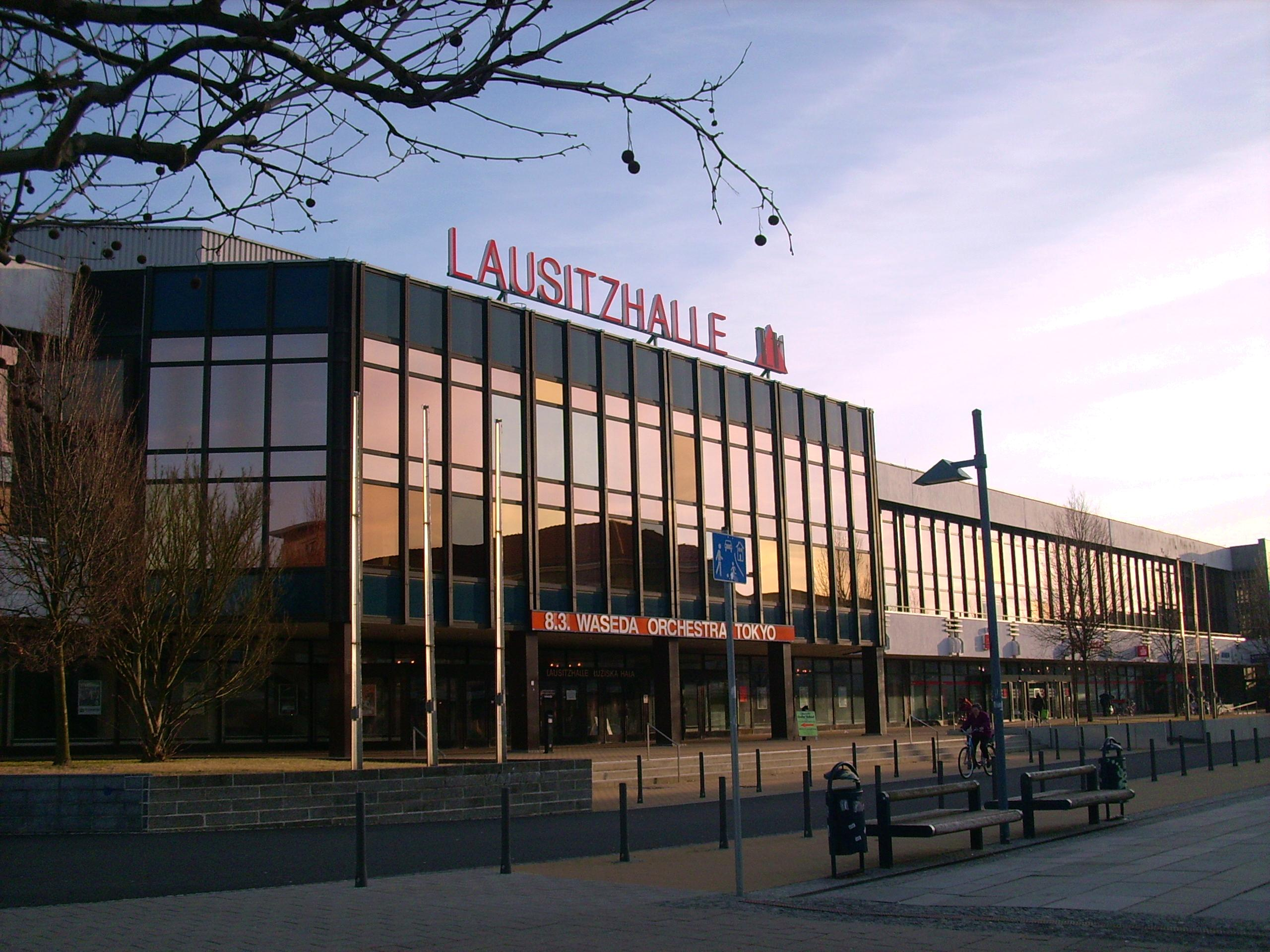 Lausitzhalle am Lausitzer Platz in Hoyerswerda